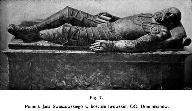 Ян Свошовський